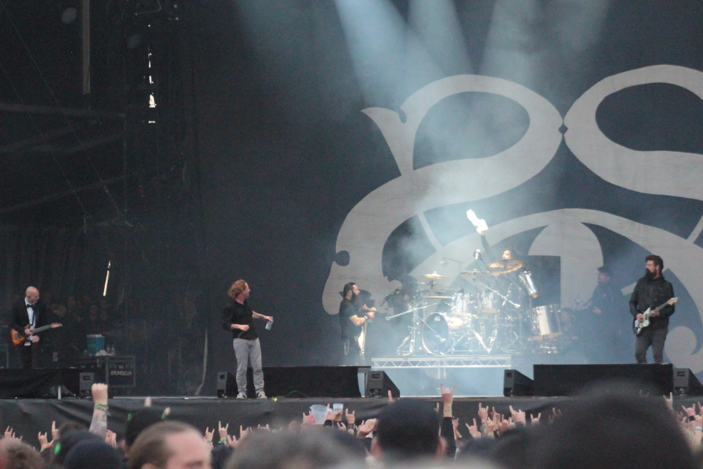 Stone Sour, Hellfest 2013, Fr-44-Clisson.